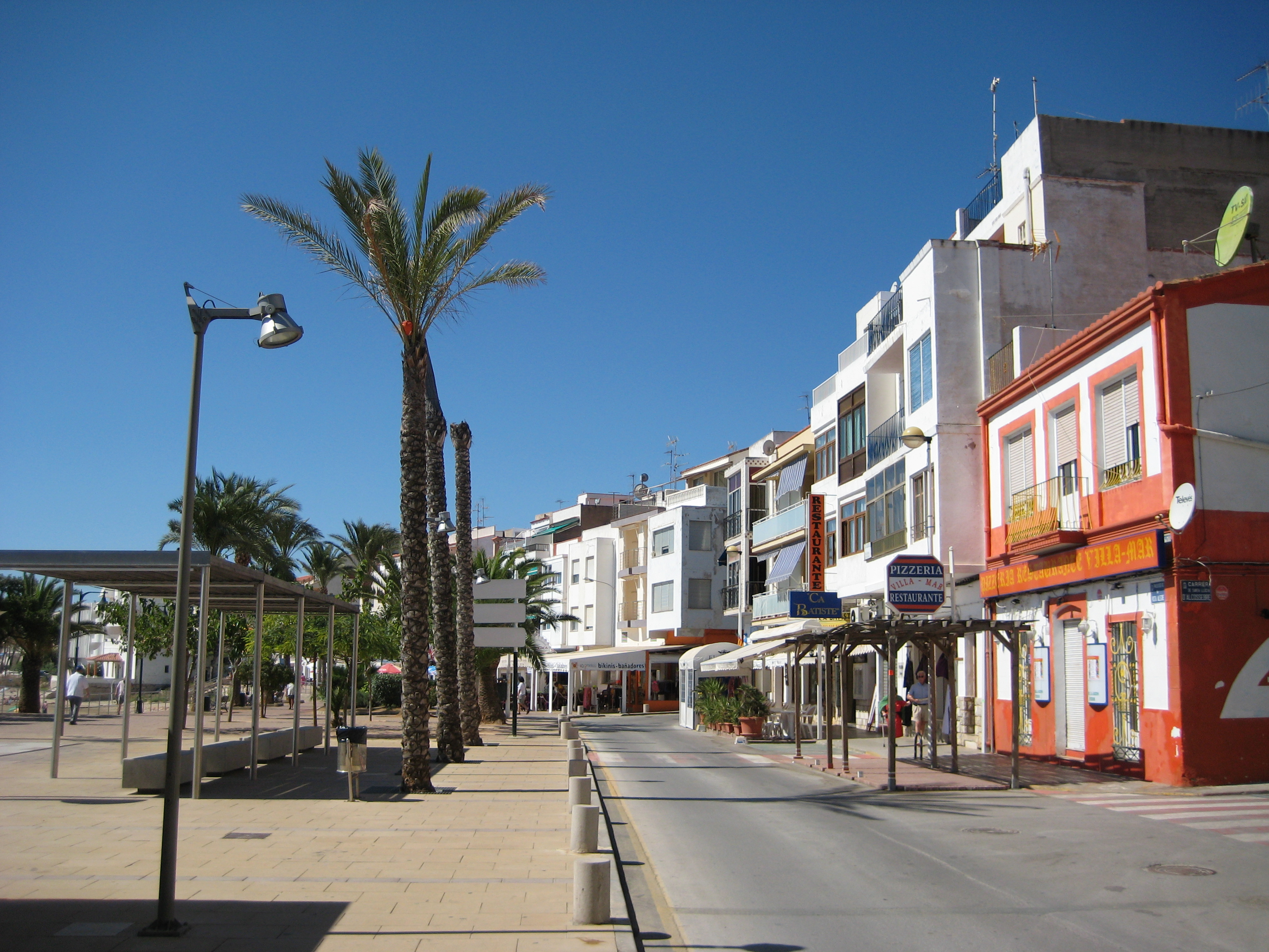 Plaça Vista Alegre d'Alcossebre (Alcalà de Xivert)